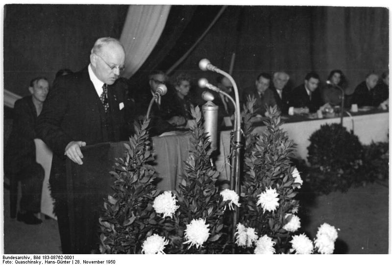 Illus-Quasch[insky], 28.11.50 Festkundgebung zum feierlichen Austausch der Ratifizierungsurkunden über die Oder-Neisse-Friedensgrenze. Am 28.11.50 fand nach dem feierlichen Austausch der Ratifizierungurkunden über das Abkommen zwischen der Polnischen Volksrepublik und der DDR über die Oder-Neisse-Friedensgrenze in der Komischen Oper in Berlin eine Festkundgebung statt, die von der Nationalen Front und der deutsch-polnischen Gesellschaft für Frieden und gute Nachbarschaft veranstaltet wurde. UBZ: Prof. Stroux während seiner Ansprache.